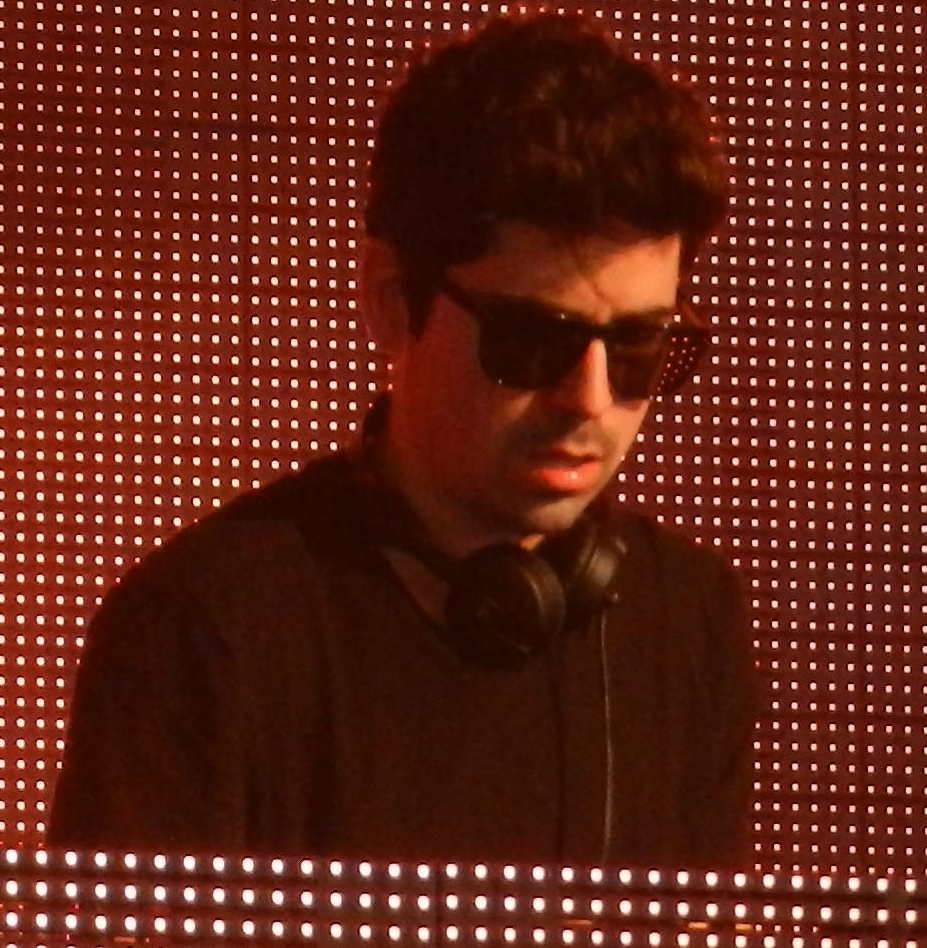 Felix Cartal